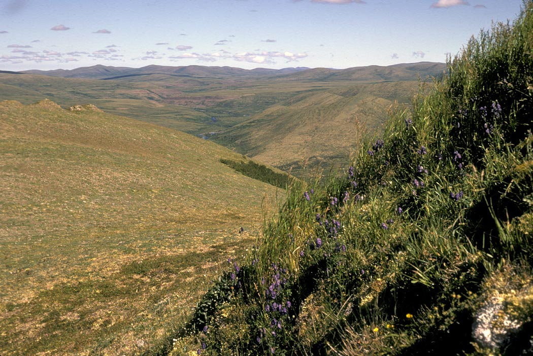 Upper Andreafsky River, Yukon Delta National Wildlife Refuge